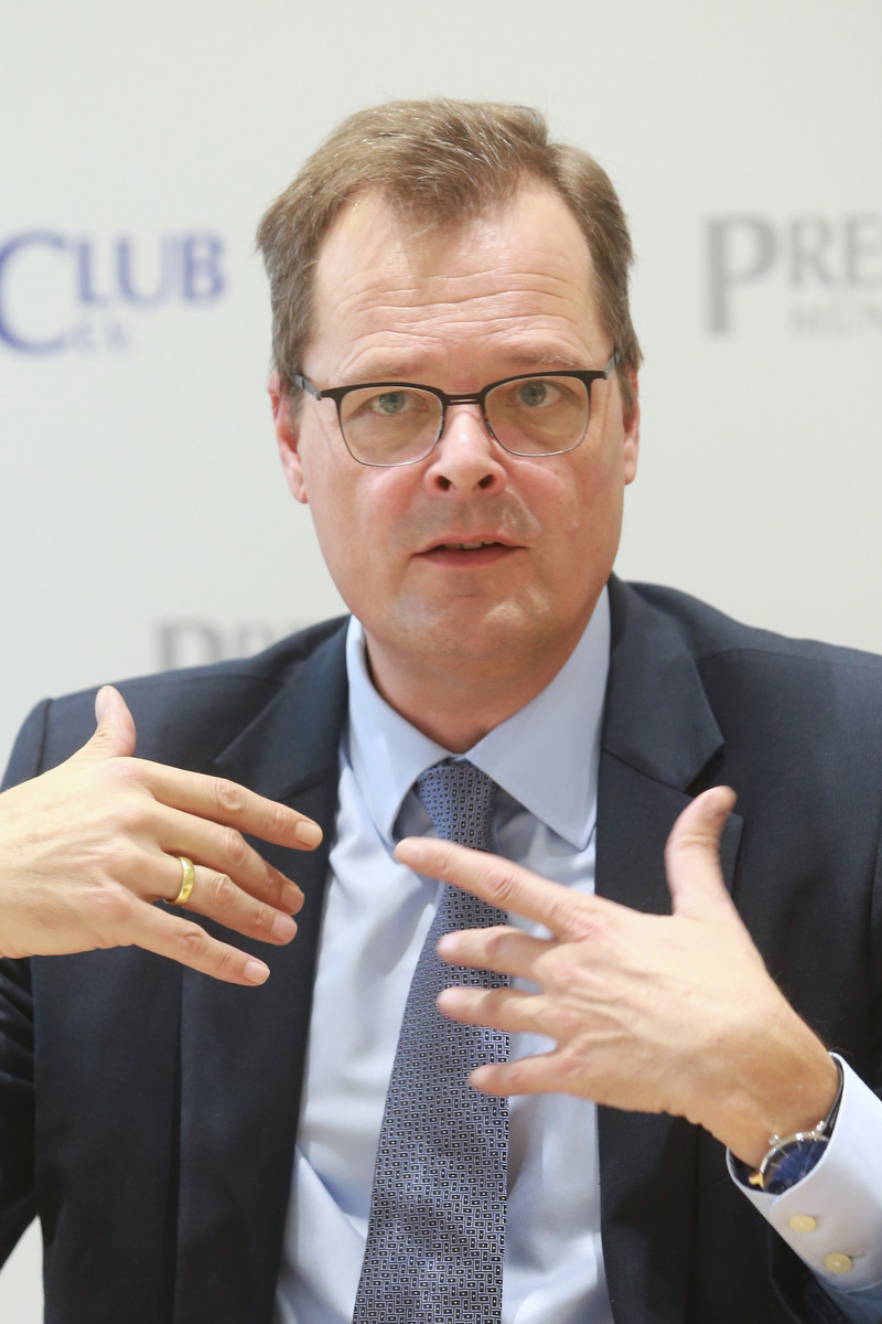 Joachim Wuermeling, ehemaliger Politiker (CSU), seit 2016 Mitglied im Vorstand der Deutschen Bundesbank. Hier während einer Veranstaltung am 20. September 2017 im Internationalen Münchner PresseClub. Titel des Werks: "Prof. Dr. Joachim Wuermeling(2017)"